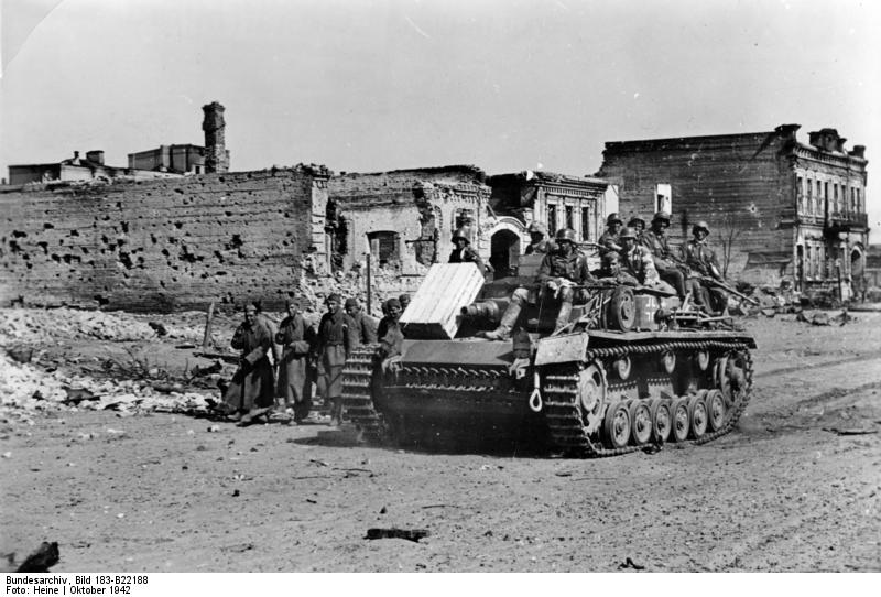 Russland, Kampf um Stalingrad, Sturmgeschütz Sturmgeschütze in den Ruinen von Stalingrad Alle Straßen tragen die Zeichen schwerster Kämpfe. PK-Aufnahme: Kriegsberichter Heine 14.10.42 [Herausgabedatum] [Sowjetunion.- Schlacht um Stalingrad.- Aufgesessene Infanterie auf Sturmgeschütz III (StuG III)]